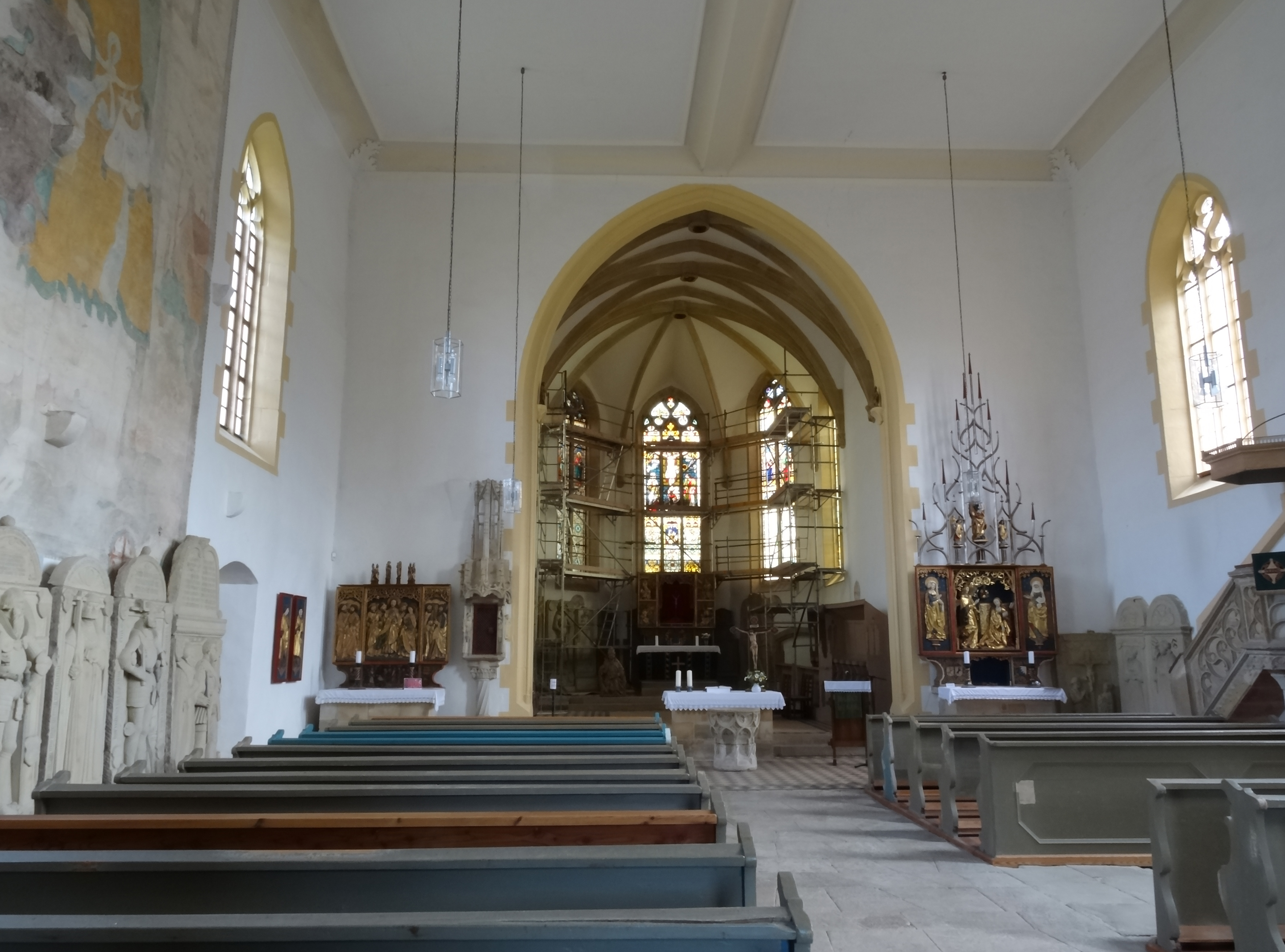 Chorraum St. Leo (Bibra) mit drei Altären und weiteren Arbeiten aus der Werkstatt Tilman Riemenschneider